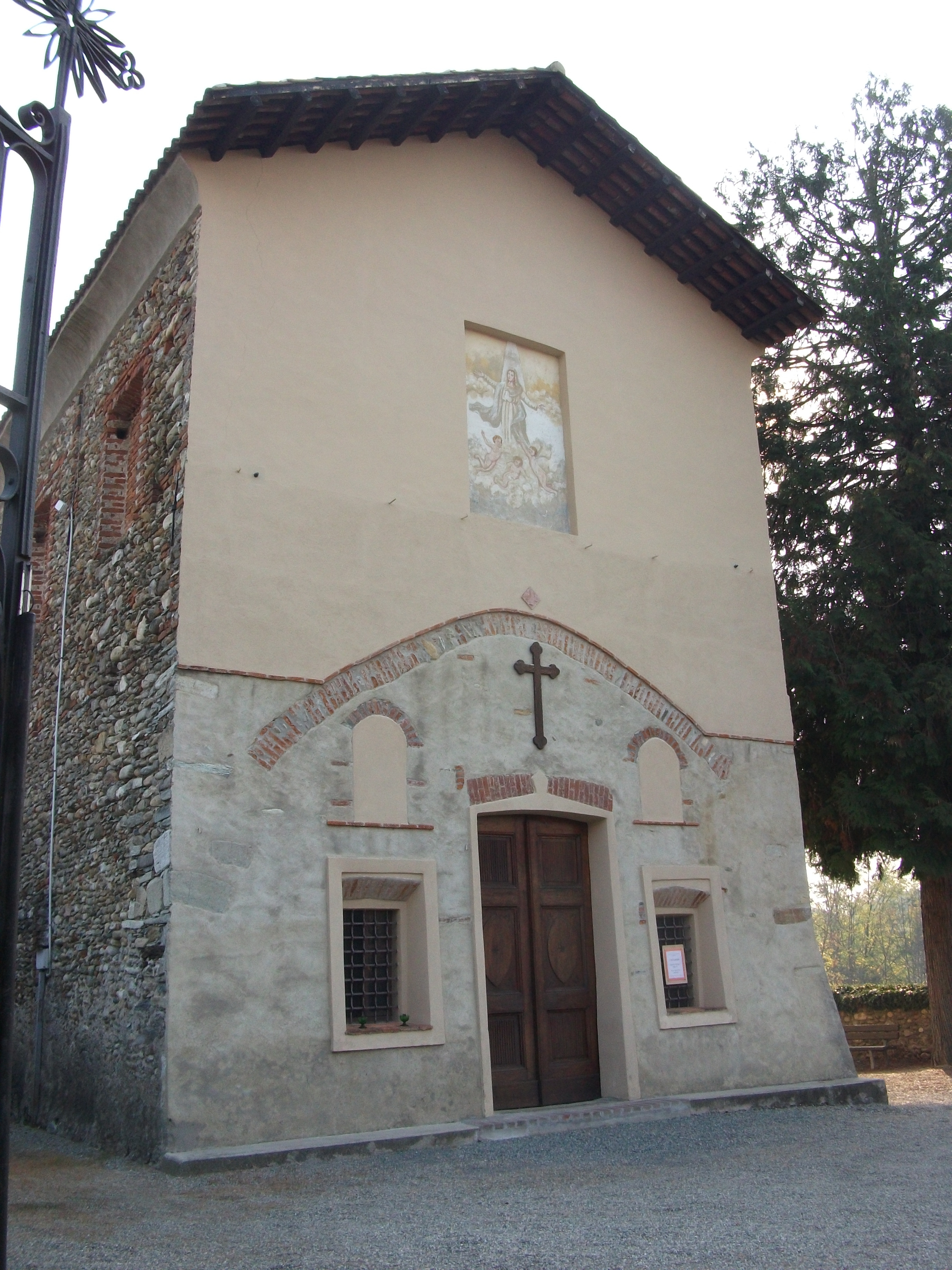 Chiesa proto-cristiana edificata su tempio pagana